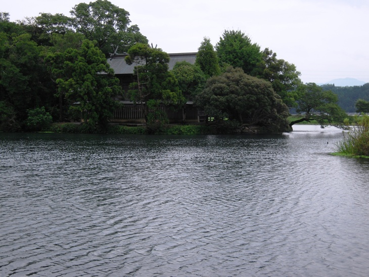 熊本県上益城郡嘉島町の浮島神社